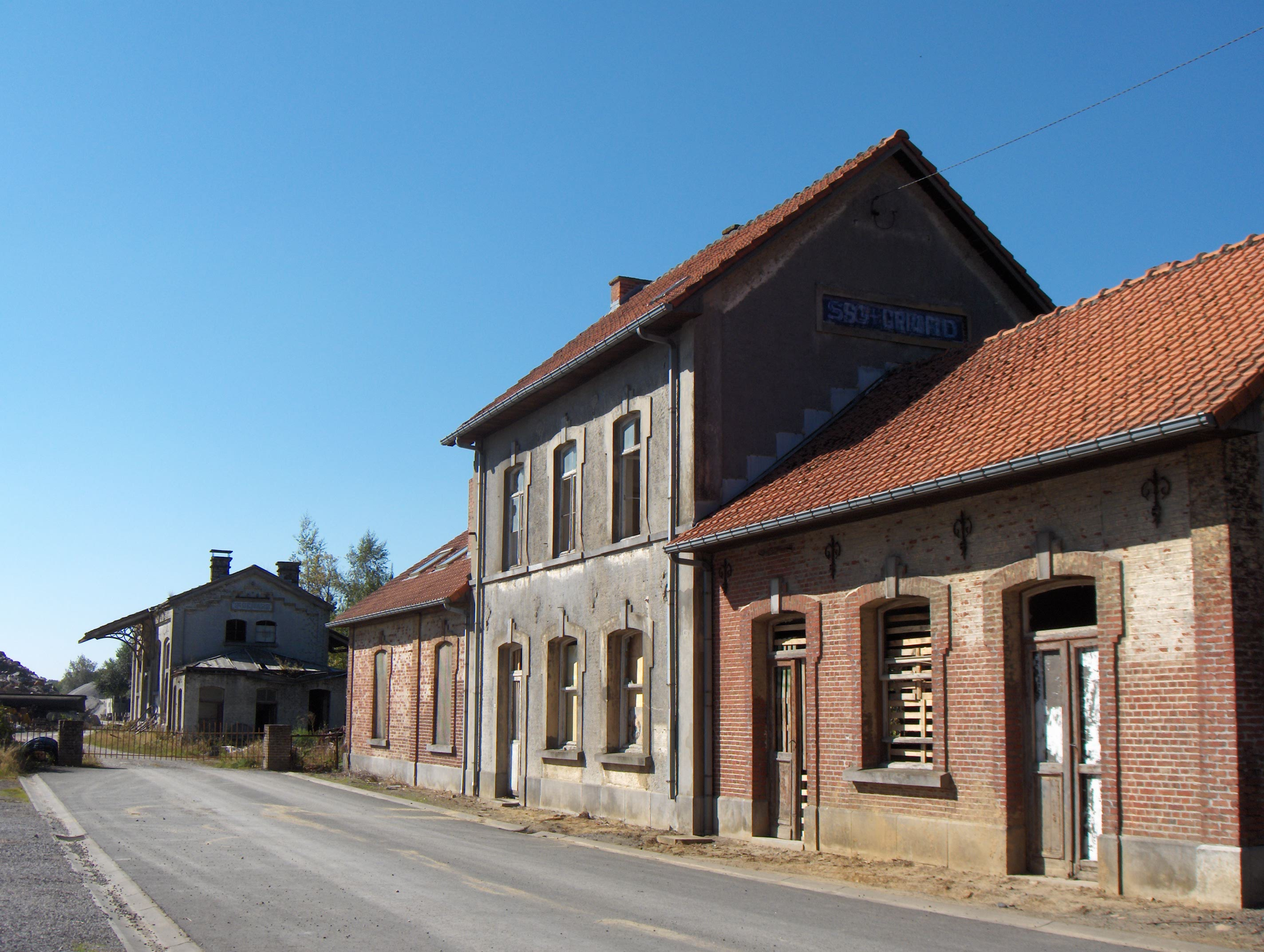 Saint-Gérard-en-Brogne (Ortsteil der Gemeinde Mettet, Belgien, Provinz Namur): ehemaliger Bahnhof an der Strecke Sambreville - Yvoir